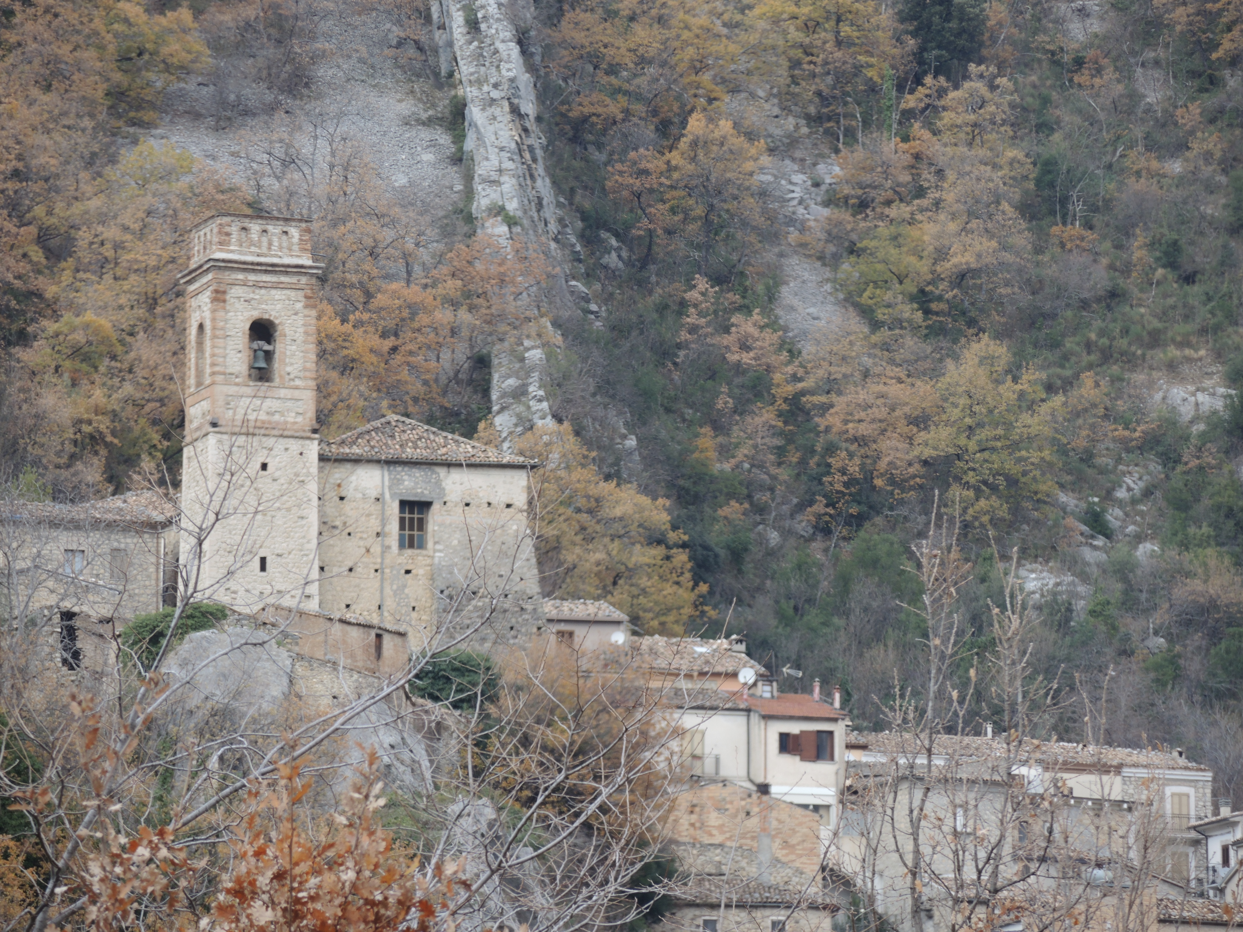 Villa Santa Maria: Chiesa della Madonna del Rosario